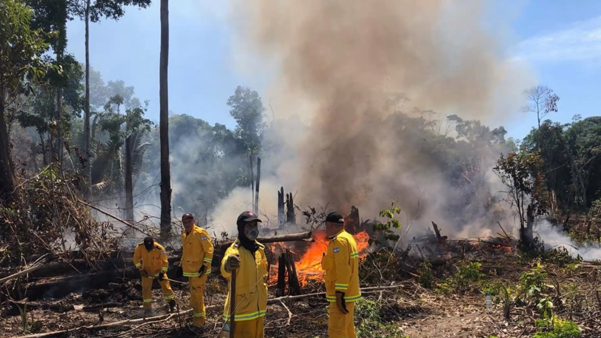 Bombeiros de Israel auxiliam no combate ao fogo na Amazônia